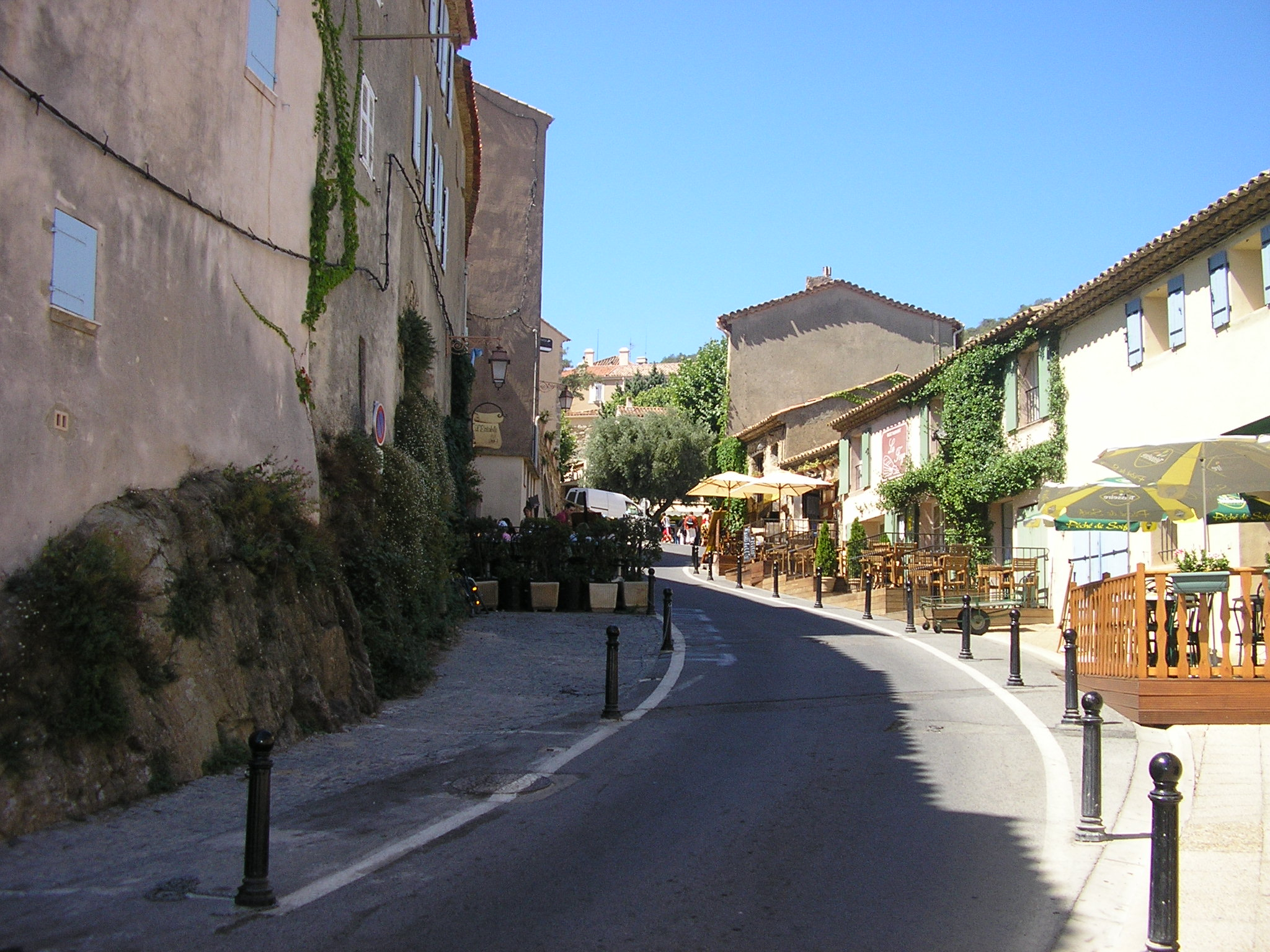 Scorcio di Ramatuelle